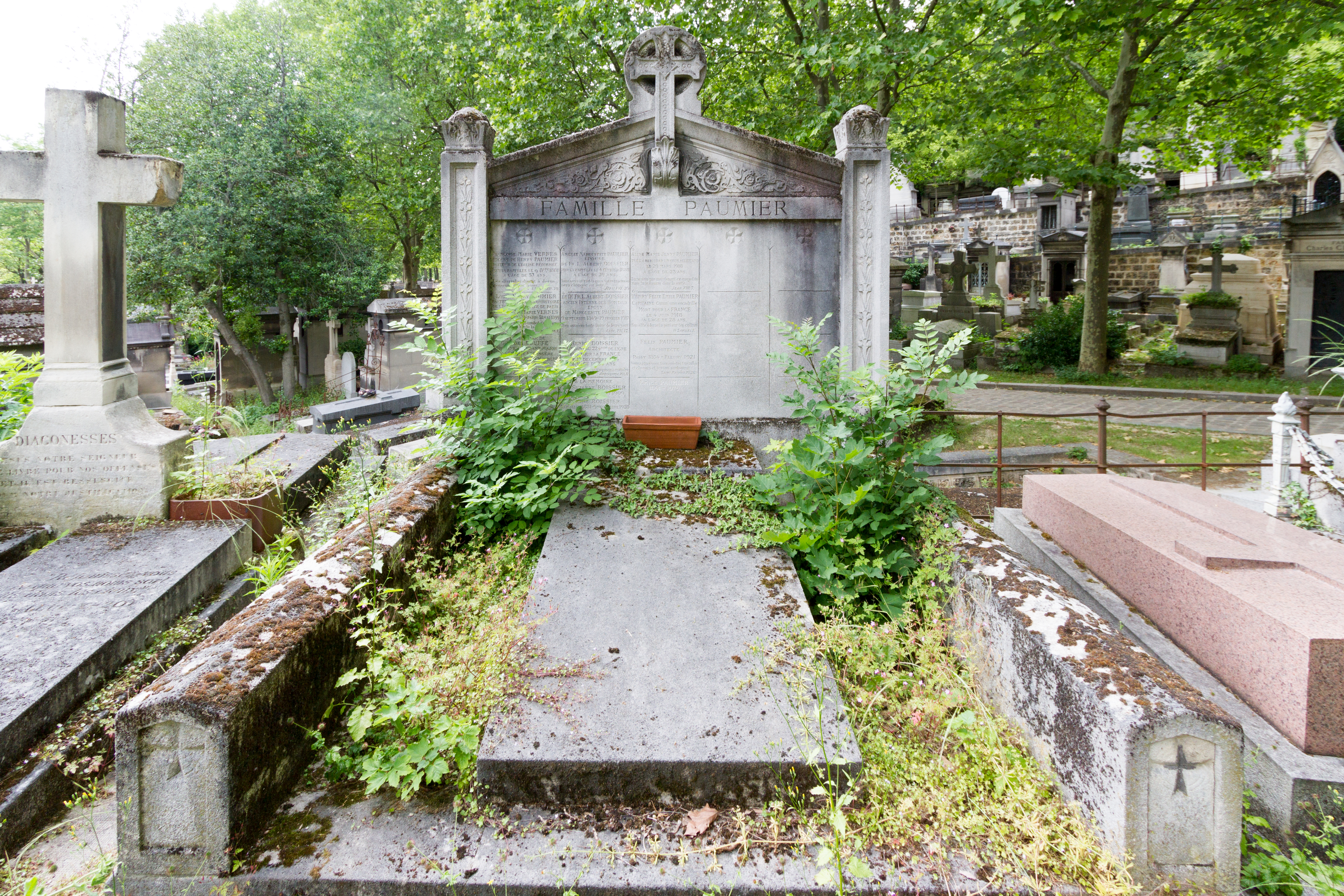 Sépulture pouvant contenir 30 caveaux dont Félix Paumier (1854-1921), architecte qui réalisa le temple des Batignolles. Le 29 mars 1918, un obus allemand tiré par un canon de type Pariser Kanonen, improprement appelé Grosse Bertha tomba sur l'église tuant 92 personnes, dont Aline-Marie-Jenny Paumier. L'obus pulvérisa le toit de la nef pendant l'office du Vendredi saint. Ce fut le bombardement le plus meurtrier de la guerre.